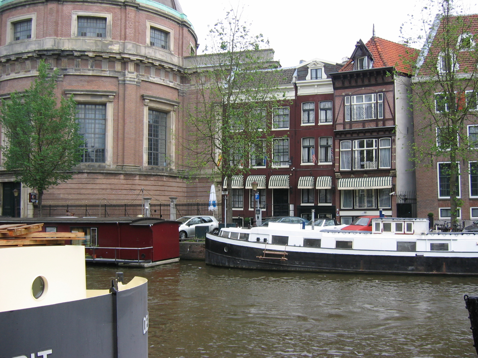 Singel 13 is rijksmonument 5149 Pand met gevel onder rechte lijst (XIXa), met empire deurpartij. Rijksmonument 2207, Kattengat 2 Nieuwe Lutherse kerk. Ronde koepelkerk in classicistische vormen met tegen de achterste helft aangebouwde "zijbeuk". Koperen dak (1668-1671 door A. Dorstman, herbouwd na brand. 1822). Orgel met Hoofdwerk, Bovenwerk, Rugwerk en vrij Pedaal, in 1830 door J.Batz gemaakt. In 1983 gerestaureerd door Flentrop Orgelbouw.